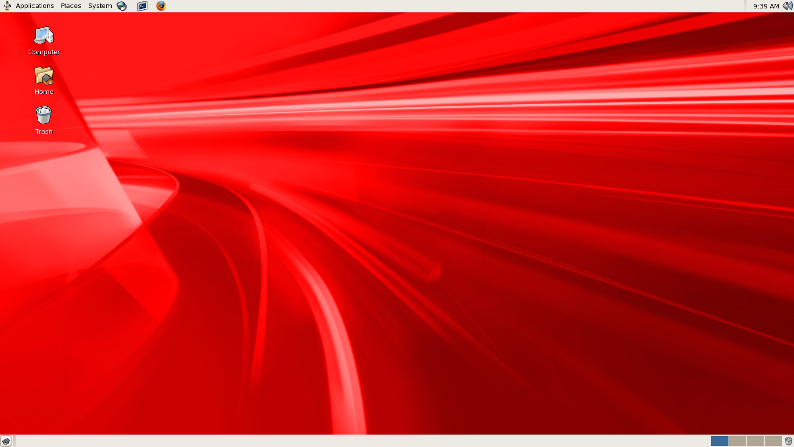 Oracle Linux Desktop